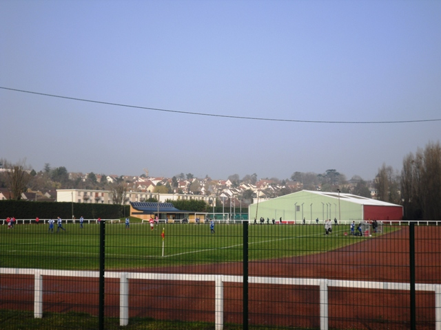 Le stade du Breuil d'Epinay-sur-Orge (91)